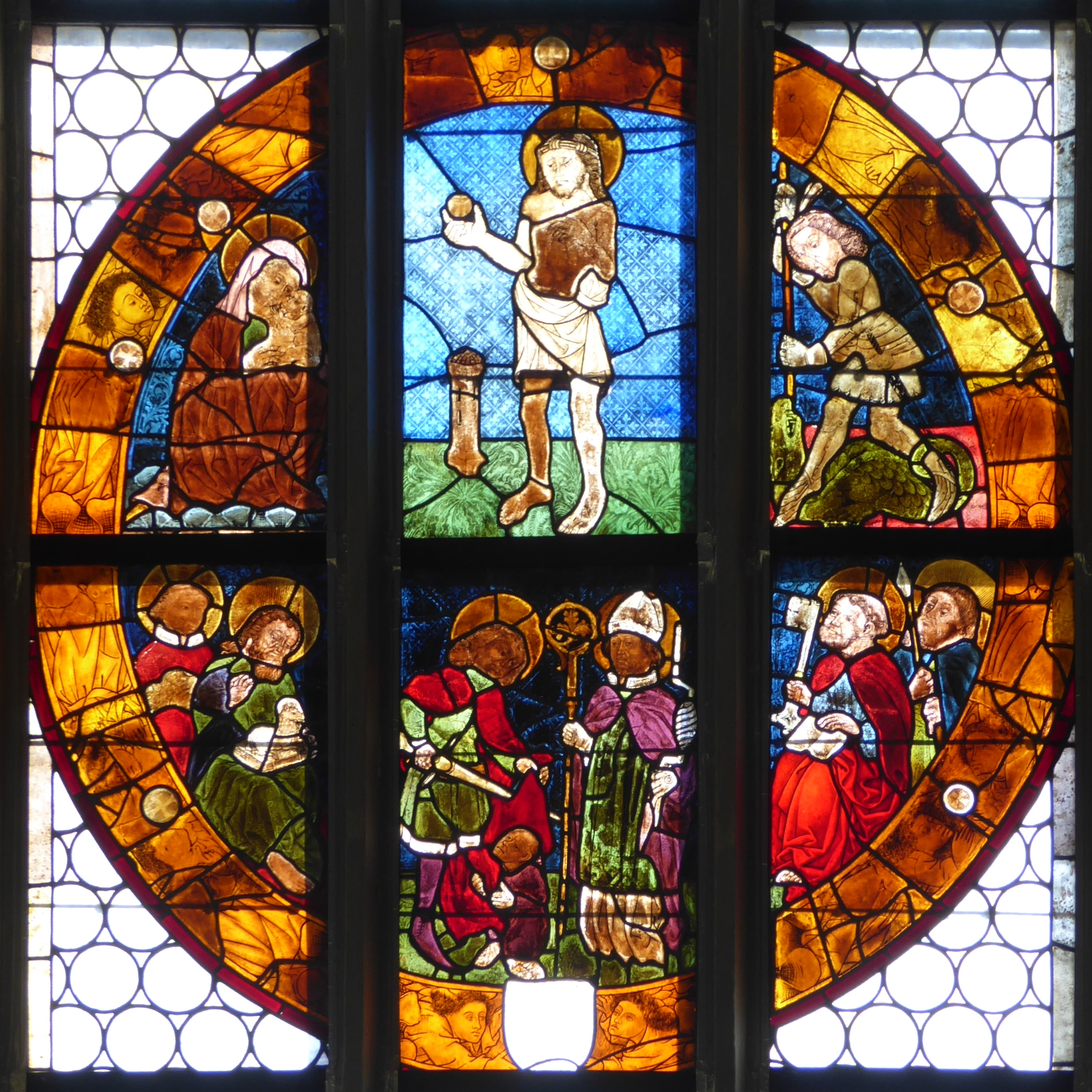 Pfarrkirche hl. Andreas, Heiligenblut 16, Raxendorf, Niederösterreich - Glasfenster (15. Jh.) oben: Schmerzensmann mit Hostie zwischen Madonna mit Kind und hl. Georg; unten: hll. Stephanus und Johannes d.T., Martin und Erasmus, Petrus und Paulus(?); im Rahmenband Engel mit Hostien